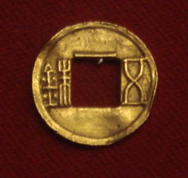 photographed in $9-$7-2007,edited in $9-$7-2008